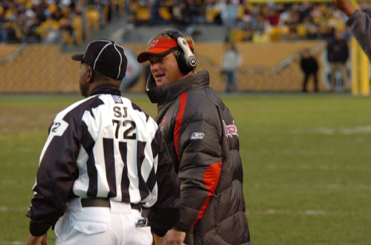 Jon Gruden at Heinz Field in Pittsburgh.